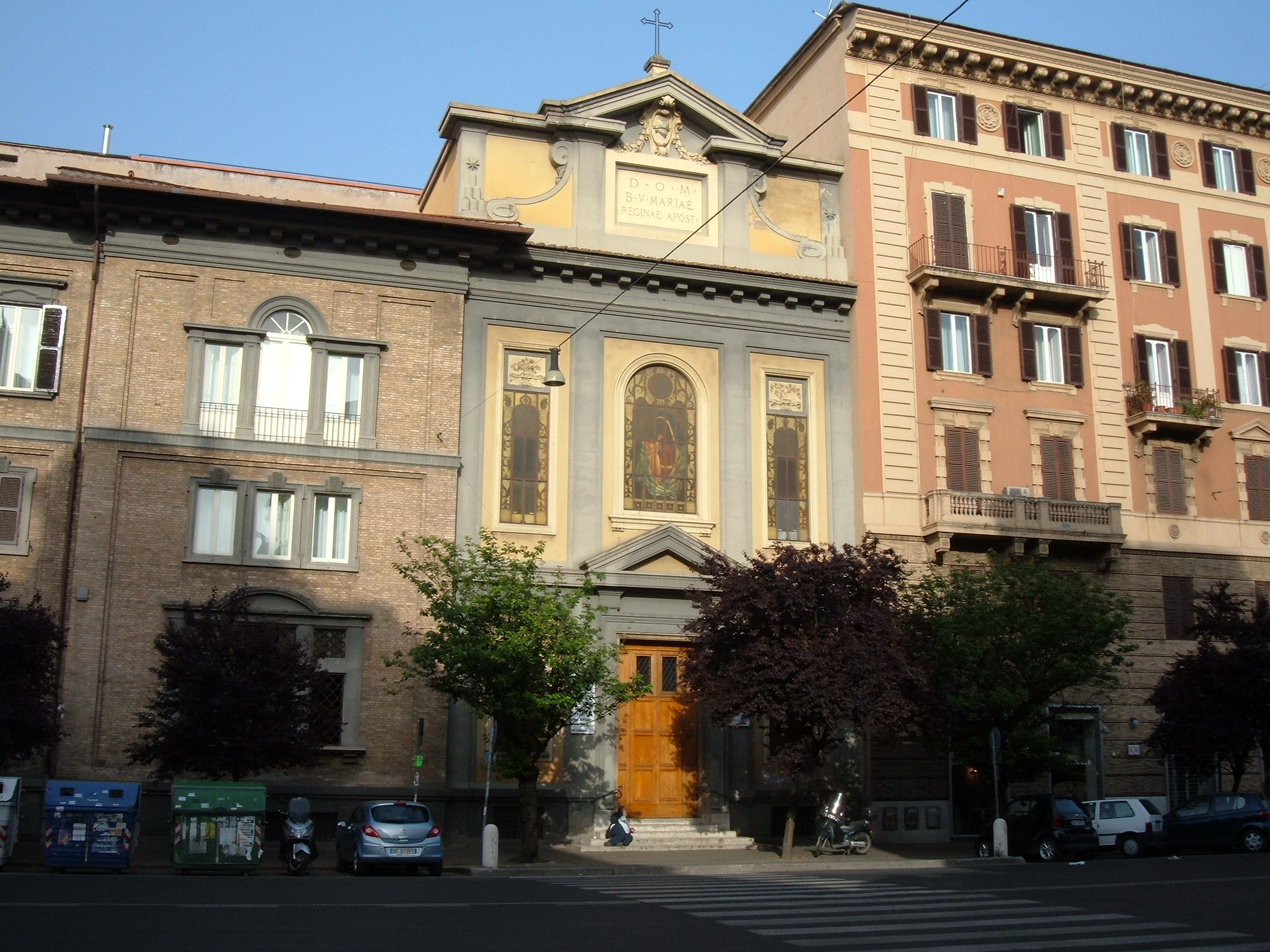 Chiesa di Santa Maria Regina Apostolorum, a Roma, nel quartiere Della Vittoria, in via Ferrari.